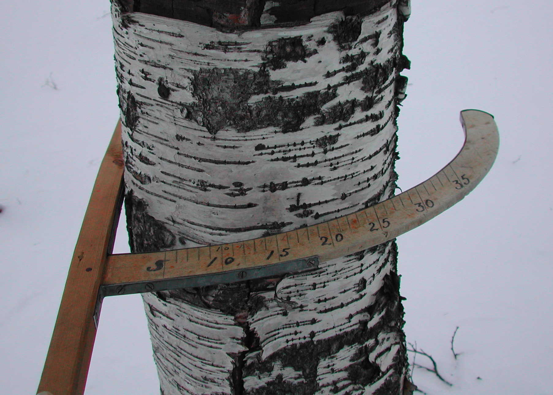 Arvidsjaur-klave